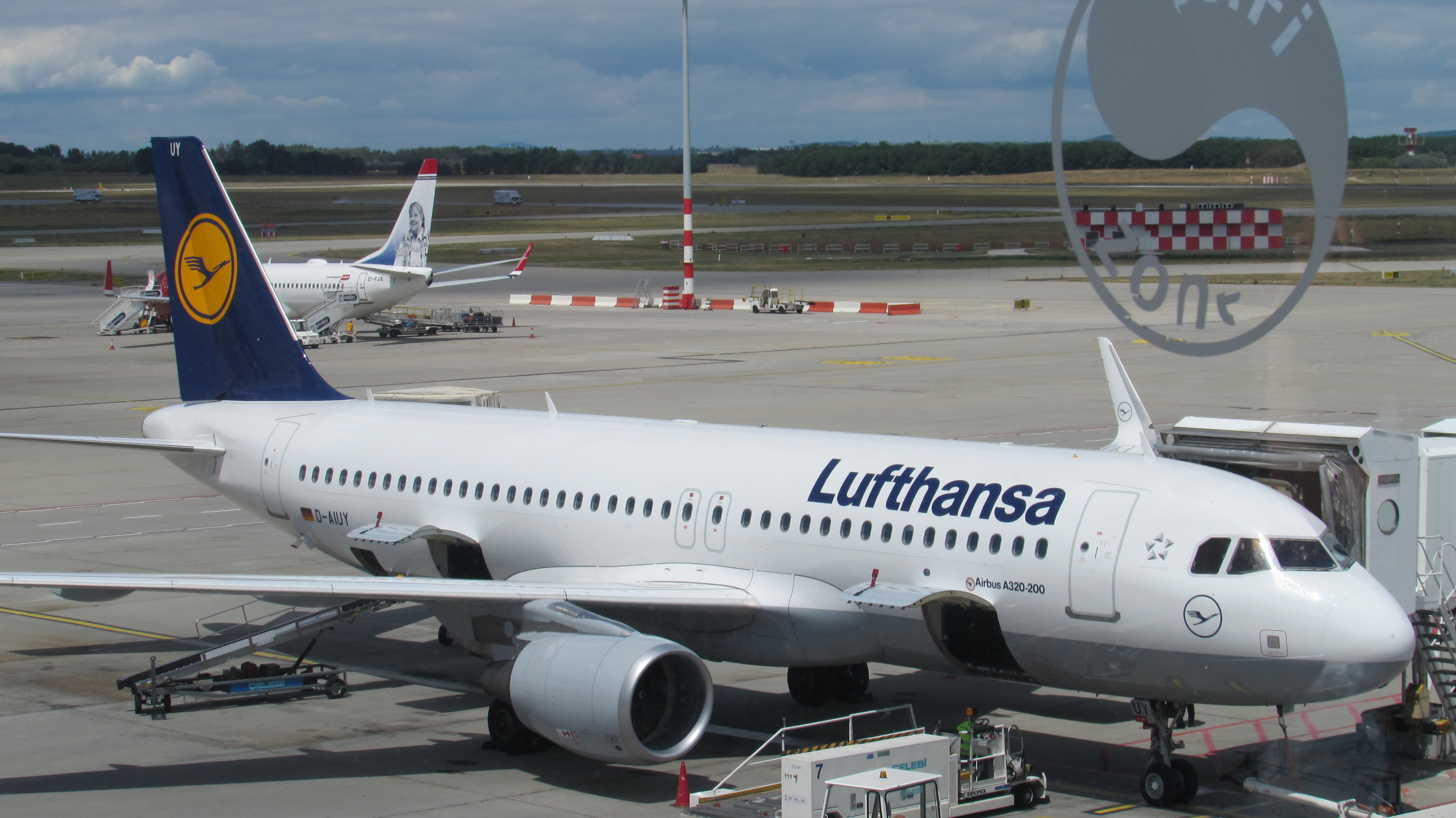 Budapest Flughafen Lufthansa